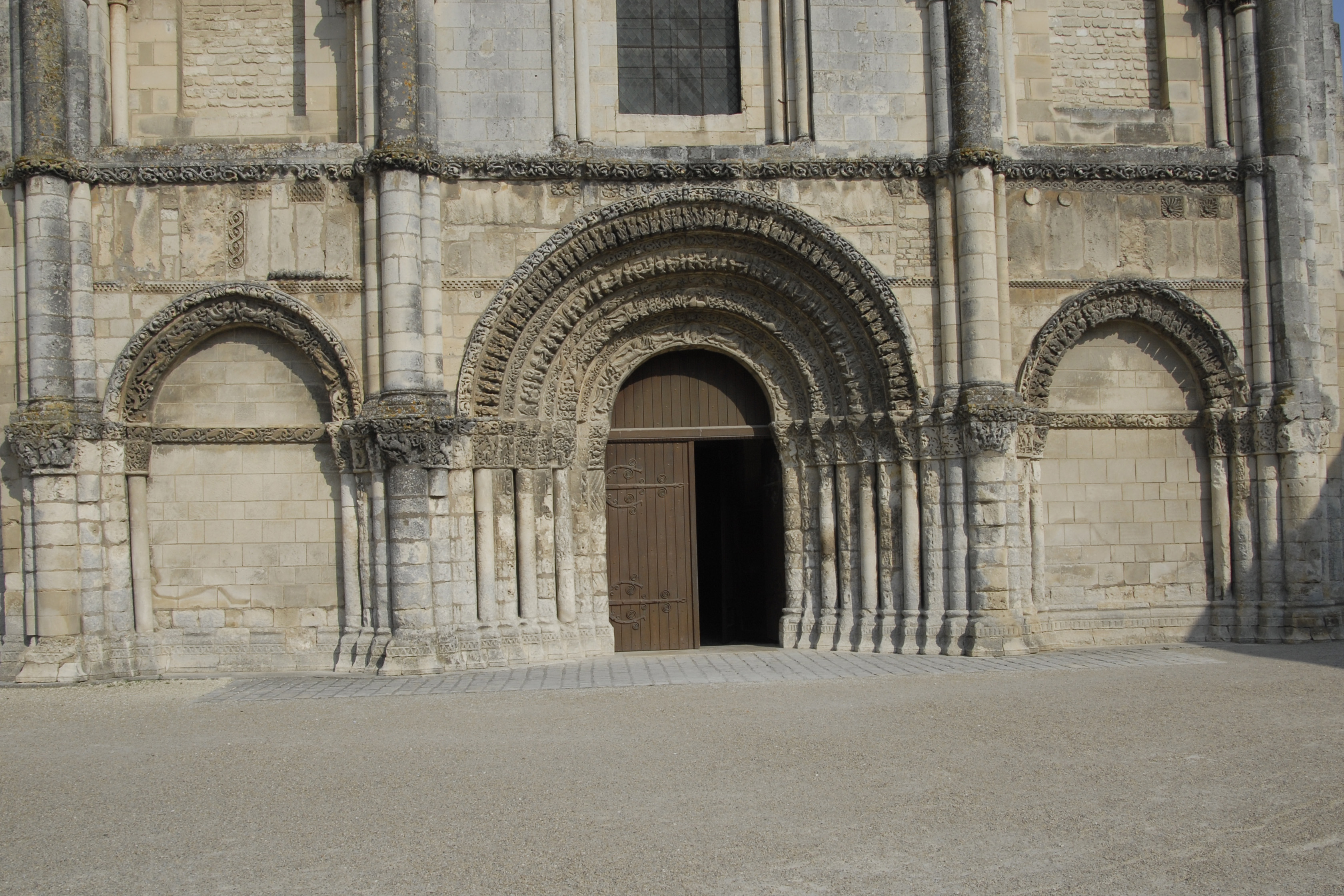 Abbaye aux Dames Saintes, Abteikirche, Fassade Erdgeschoss